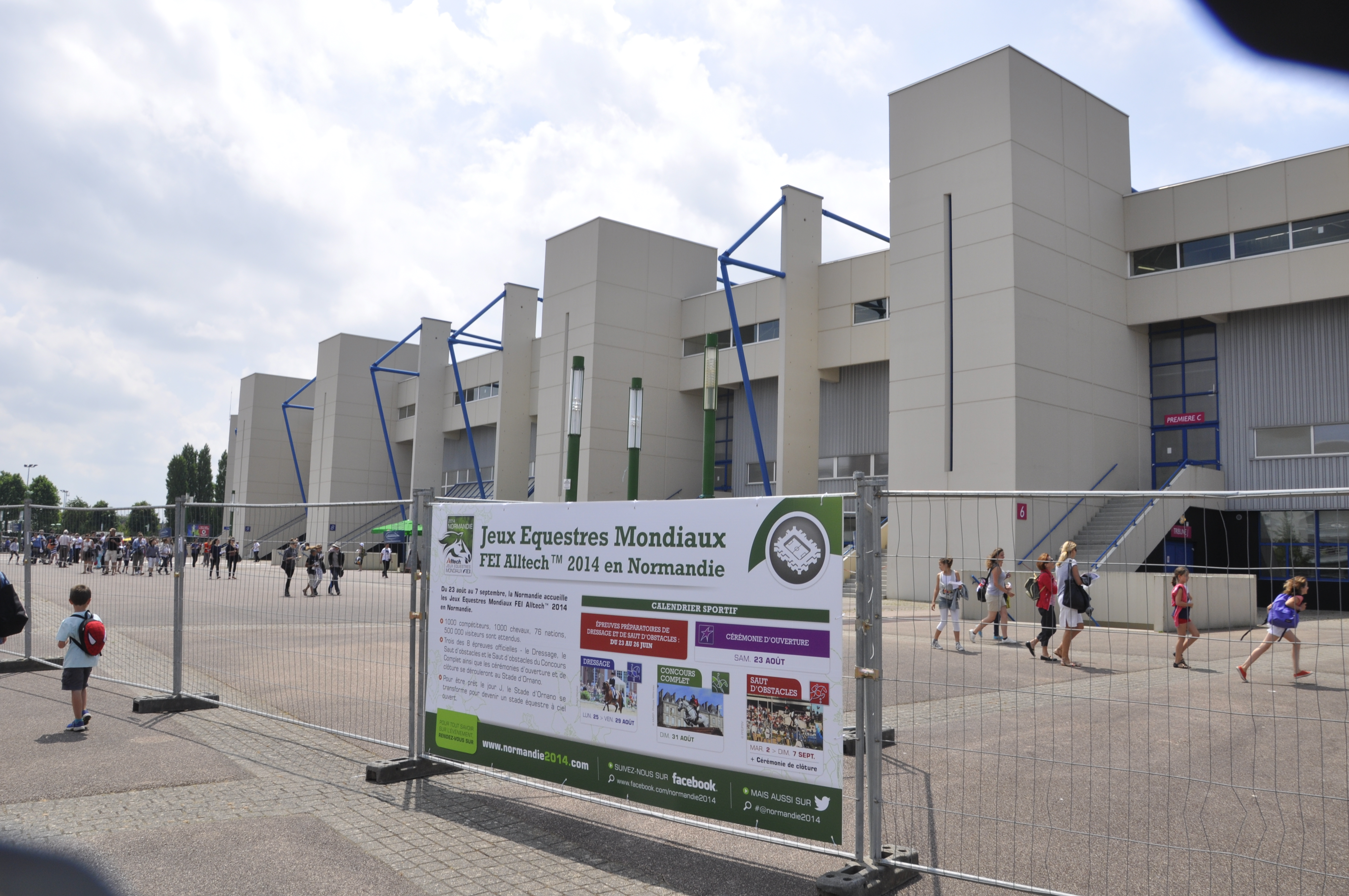 Stade d'Ornano pour les JEM 2014